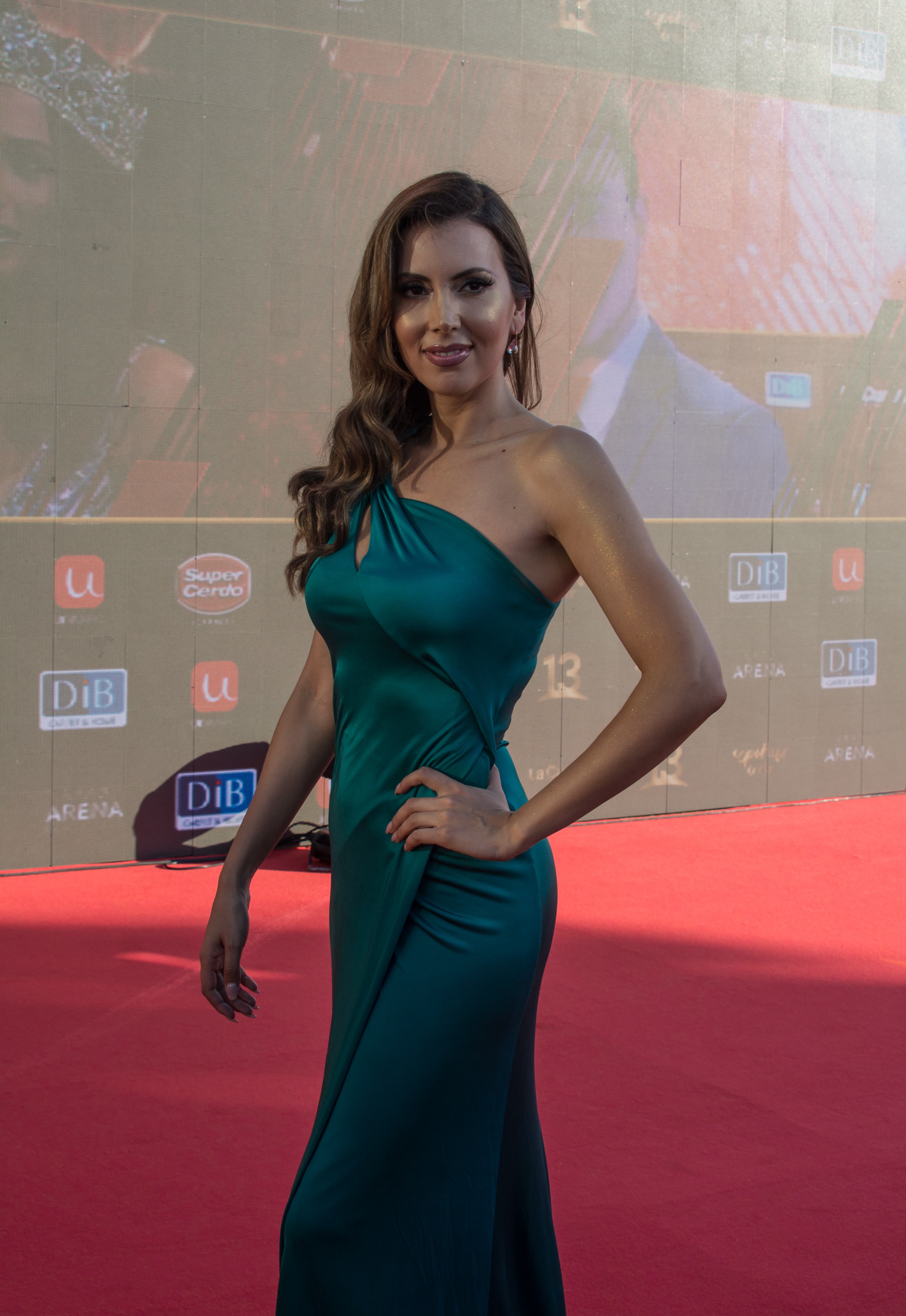 Nataly Chilet, Copihue de Oro 2018, Sun Monticello, Mostazal, Región de O'Higgins, Chile